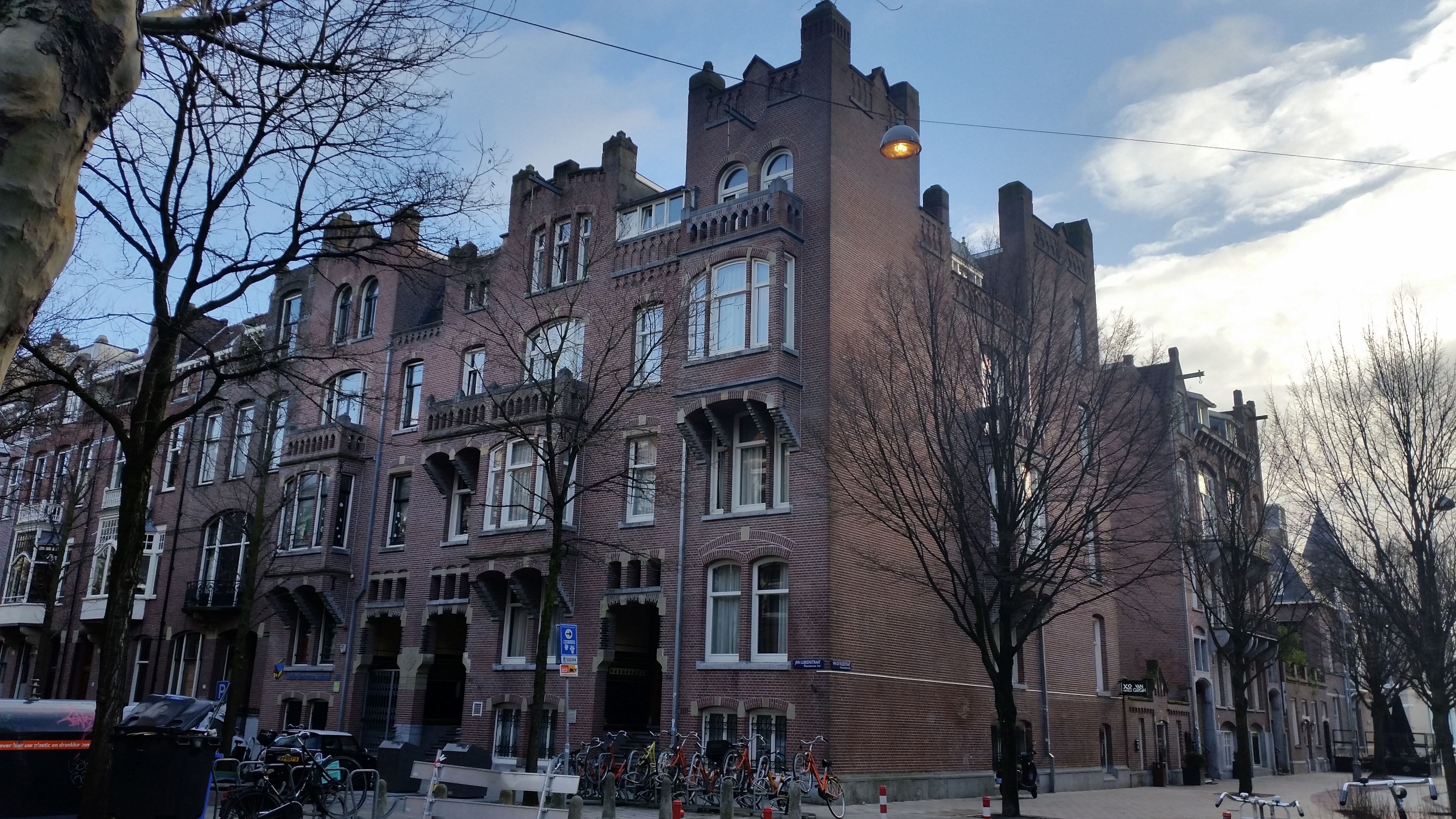 Complex Jan Luijkenstraat 29-33 (links), Van de Veldestraat (rechts), Amsterdam-Zuid